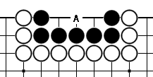 直三(圍棋)